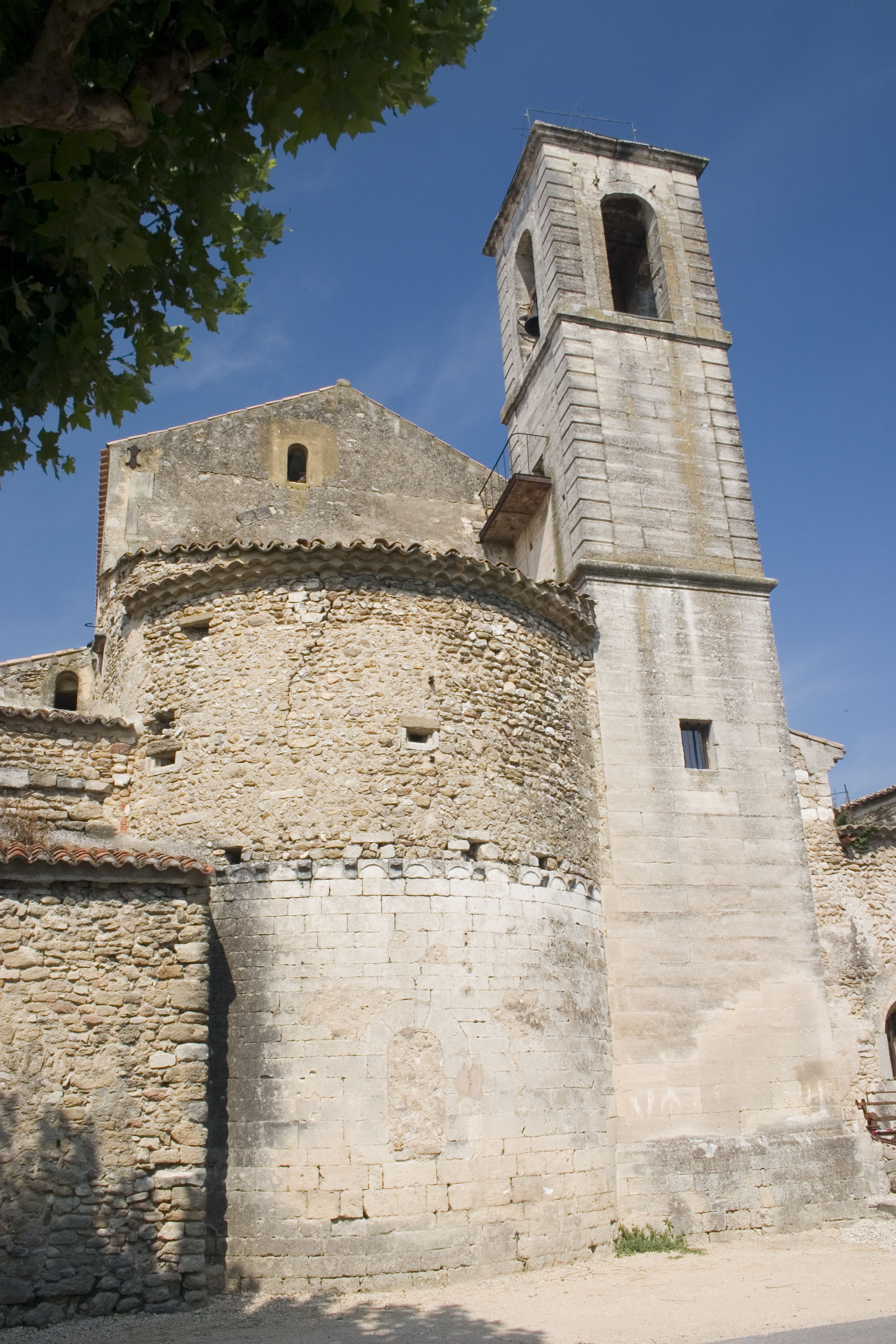 Chevet de l'église Notre-dame à Richerenches (84).